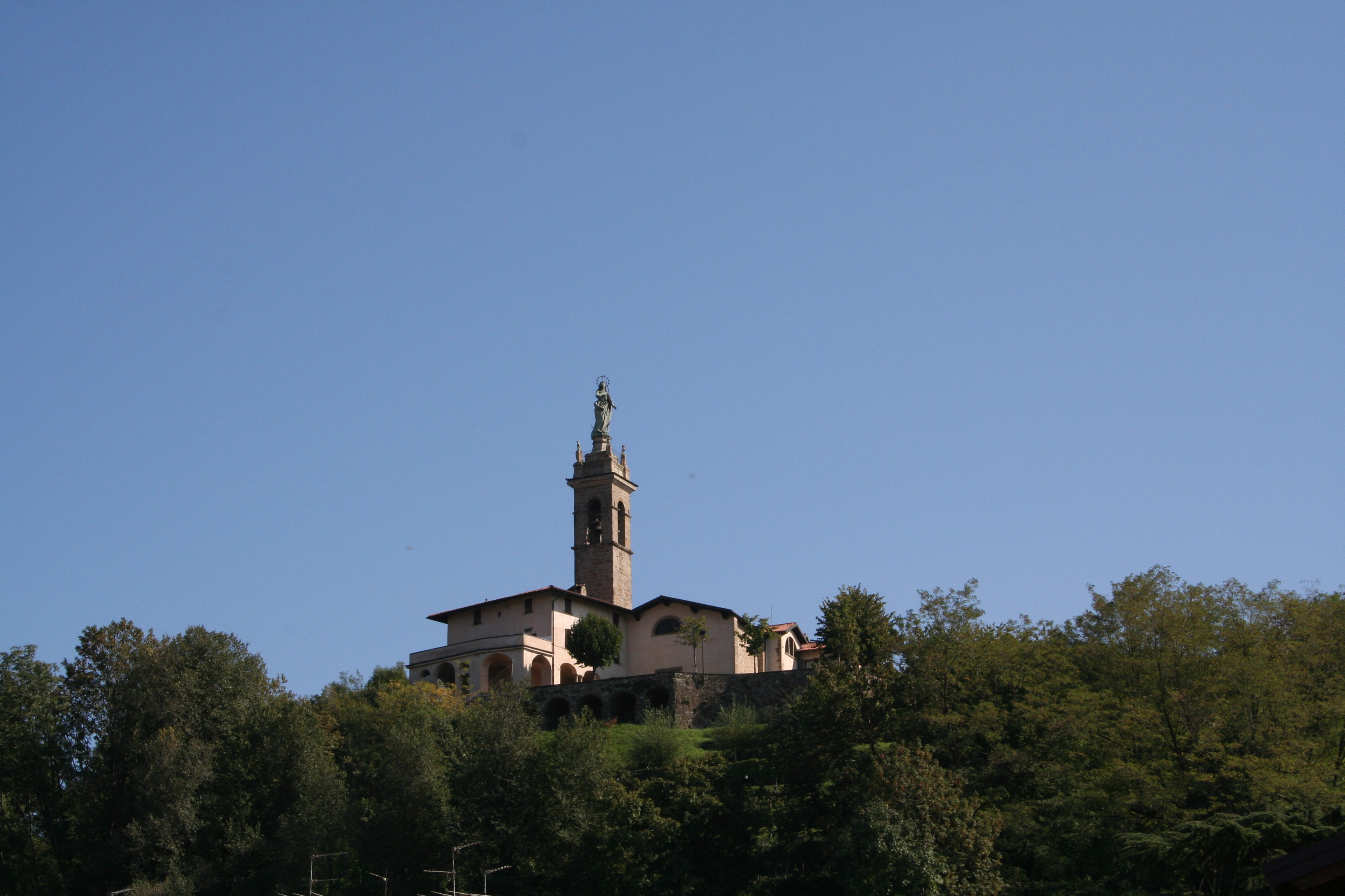 Paladina, Santuario della Madonna di Sombreno